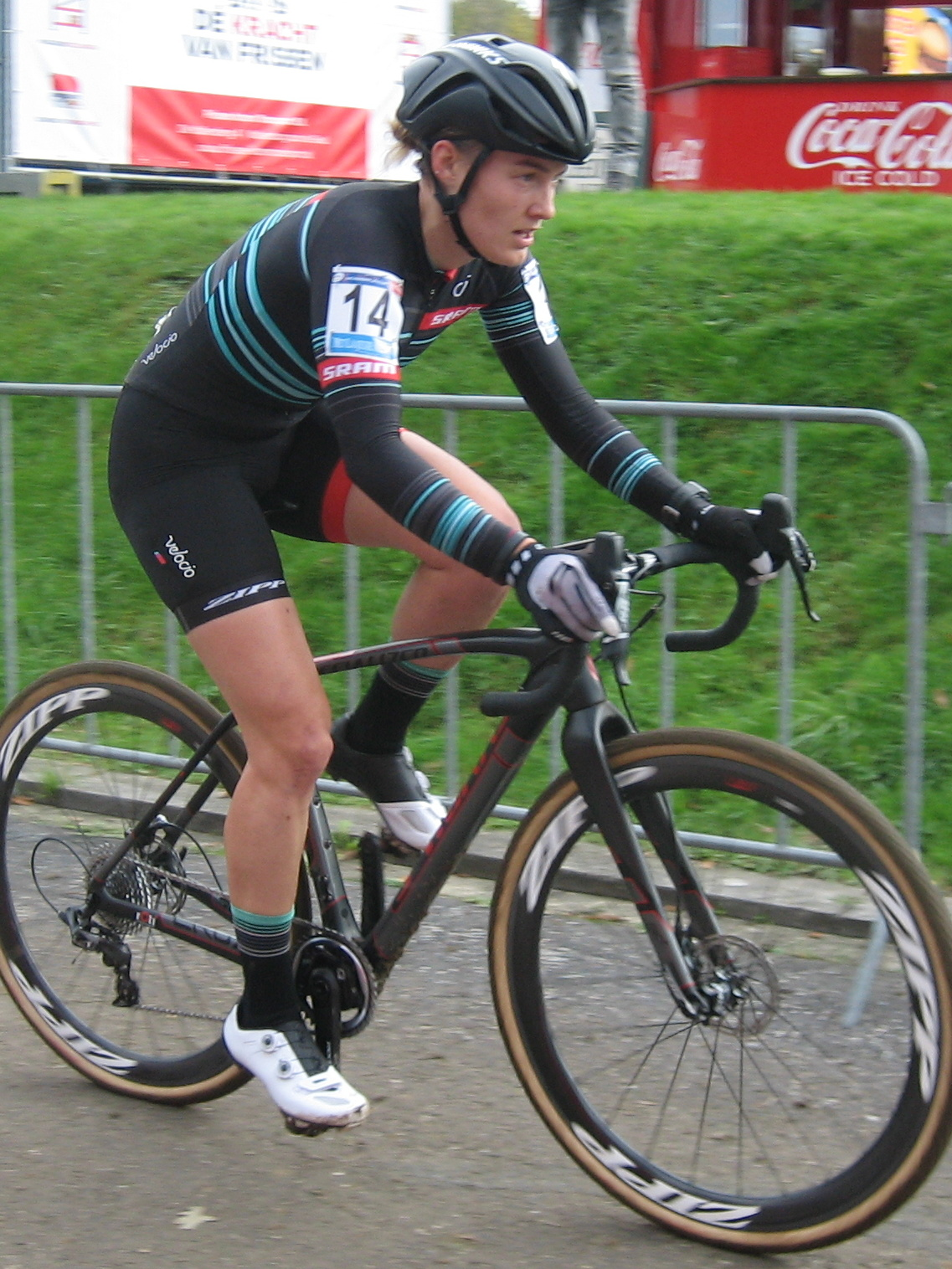 Elle Anderson (13e) in de wereldbeker veldrijden op de Cauberg in Valkenburg, Nederland, op zondag 23 oktober 2016.